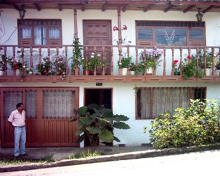 Casa